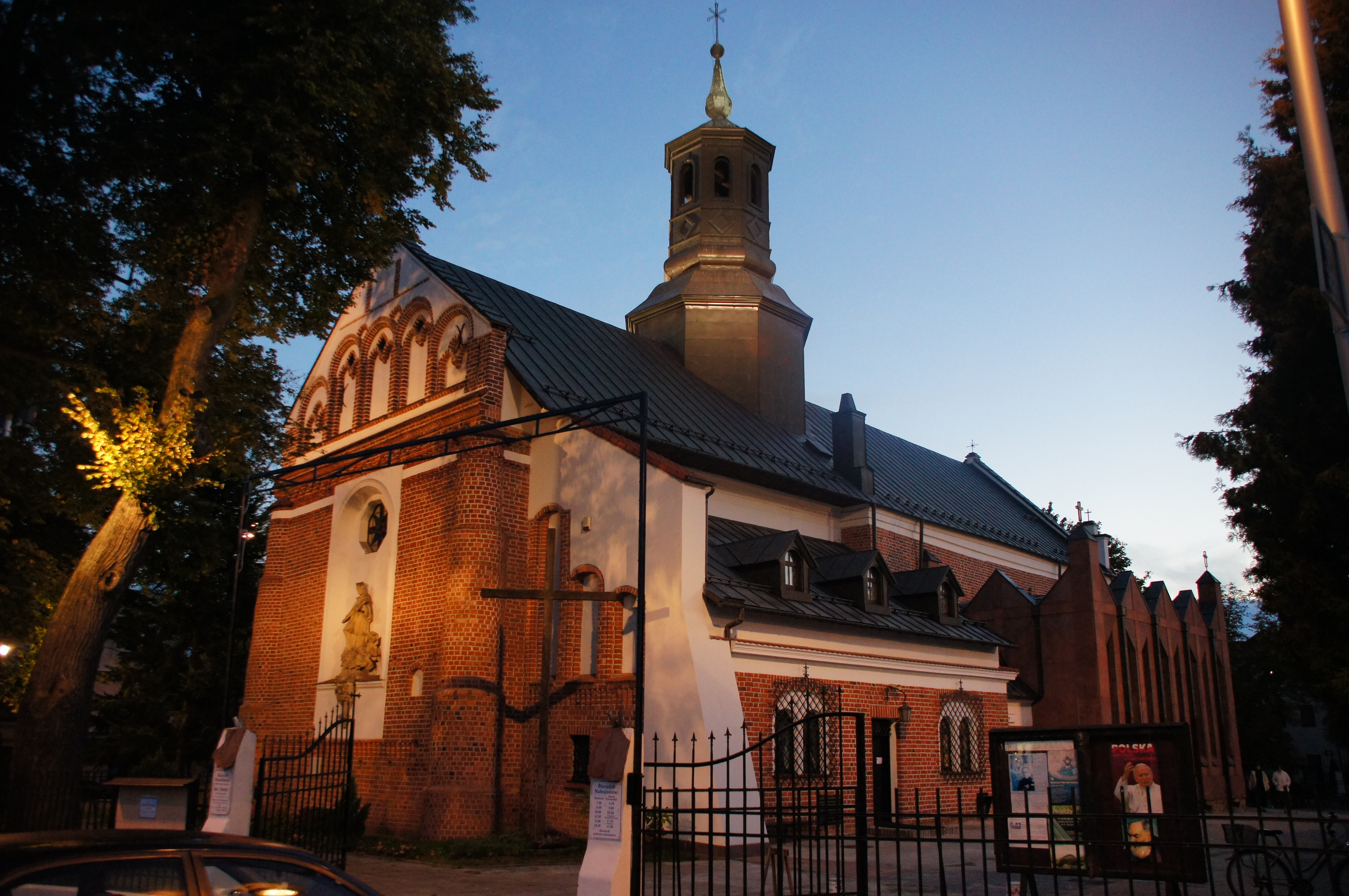 Piaseczno, kościół par. p.w. św. Macieja i św. Anny, poł. XVI, 1736